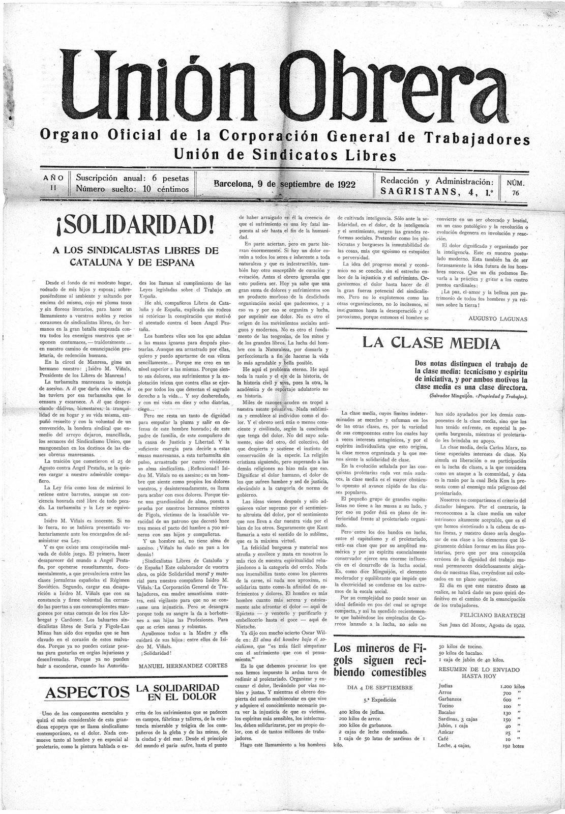 Portada del periódico Unión Obrera